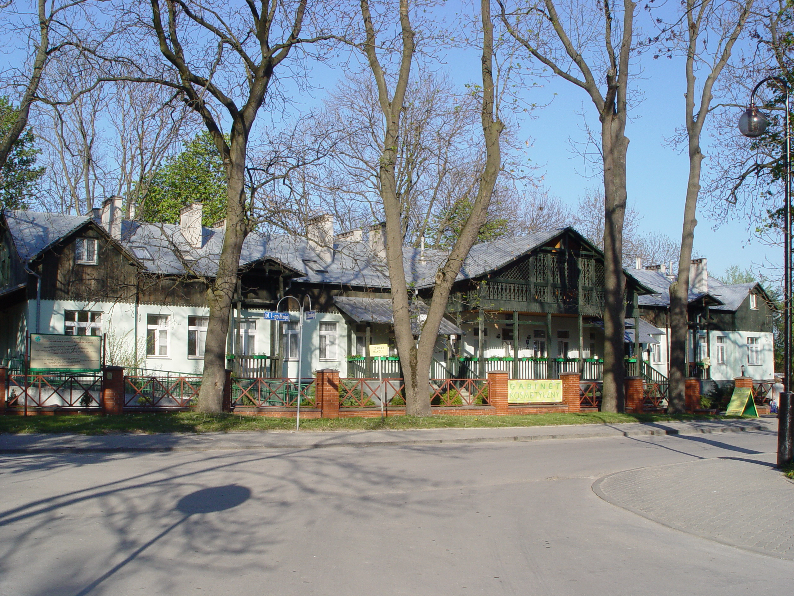 PL Busko-Zdrój Willa Zielona